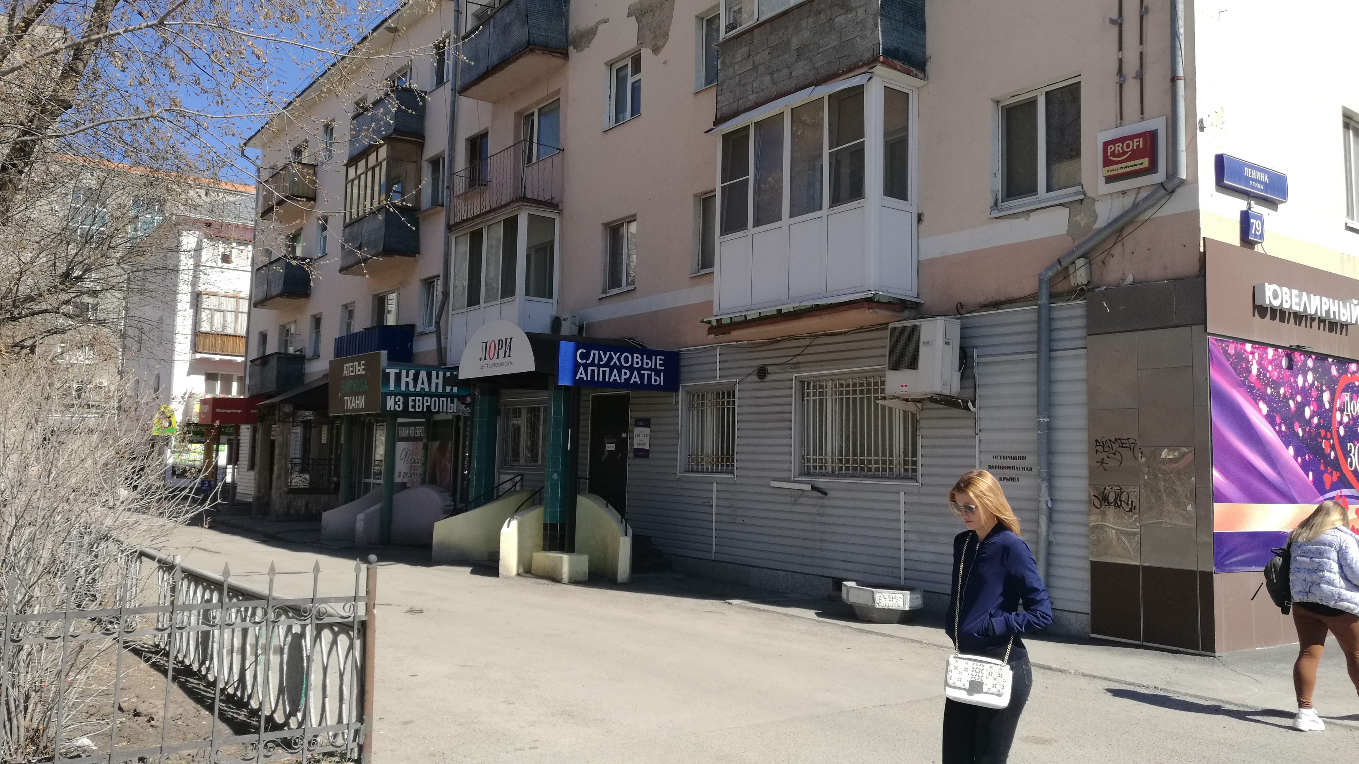 Strato Lenin. Tjumeno, Rusio.